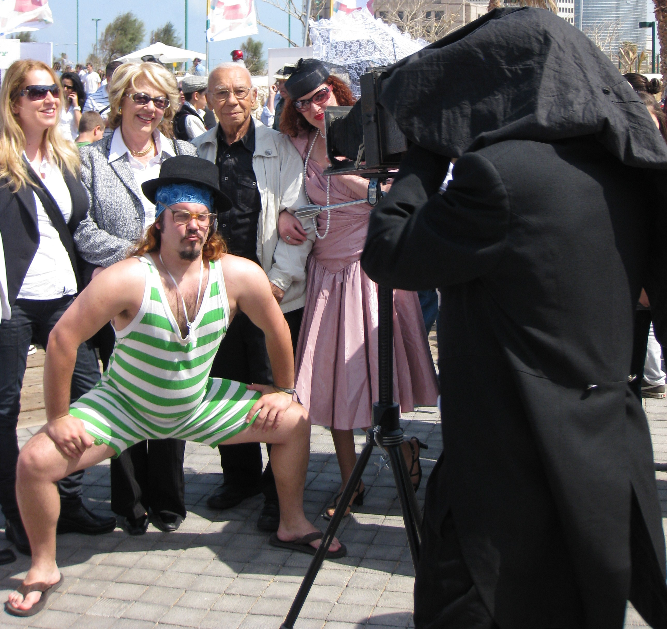 Tel Aviv 100th anniversary - Centennial Photo חגיגות המאה לתל אביב - אירוע צילום המאה במתחם התחנה בתל אביב